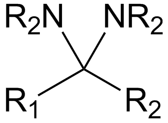 Aminal algemene structuur